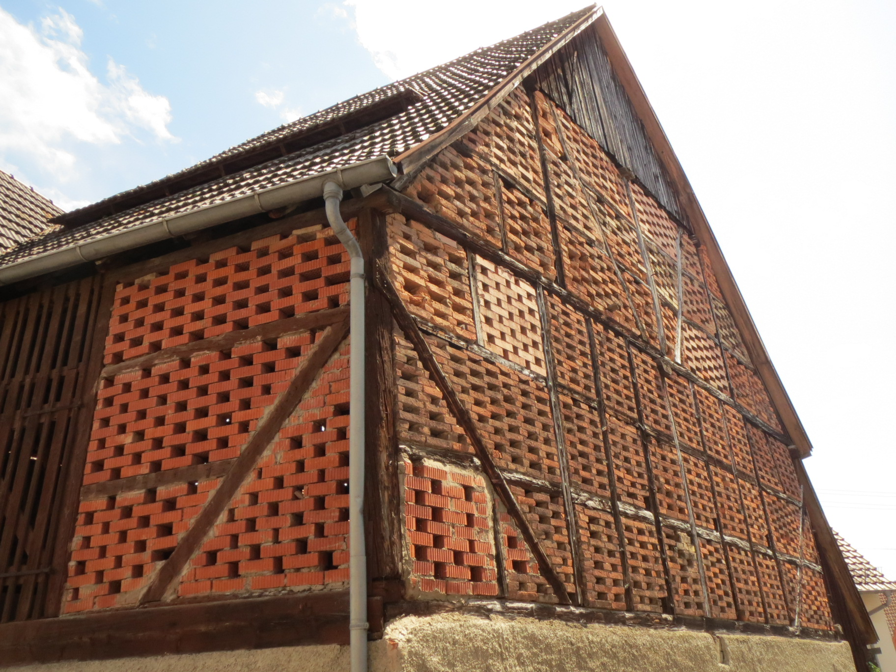 Eine Tabakscheune am Rand des alten Ortskerns von Dossenheim